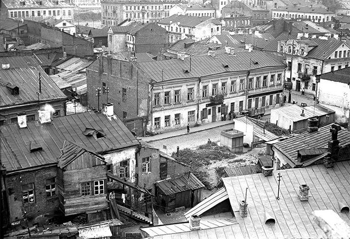 Беларуская (тарашкевіца): Менск (Miensk), скрыжаваньне вуліц Нямігі (vulica Niamiha) і Фэліцыянаўскай (vulica Felicyjanaŭskaja)